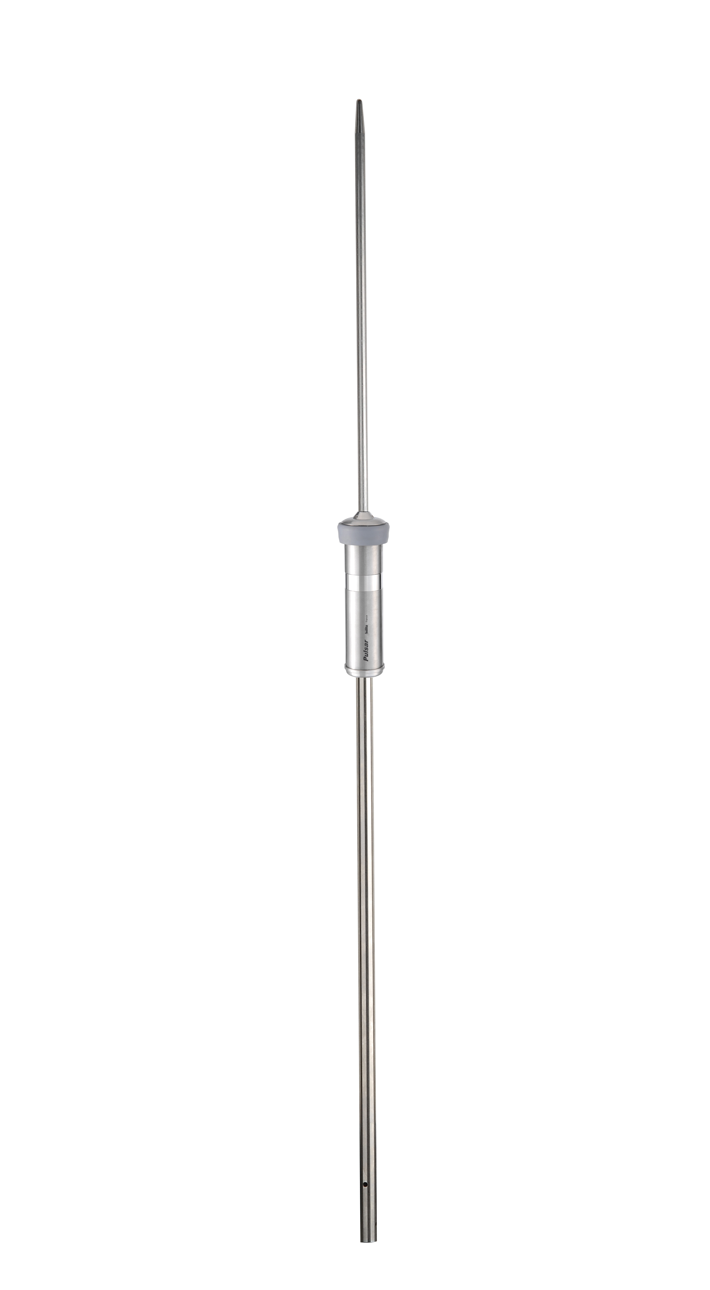 Pulsar 60, ESE lightning rod